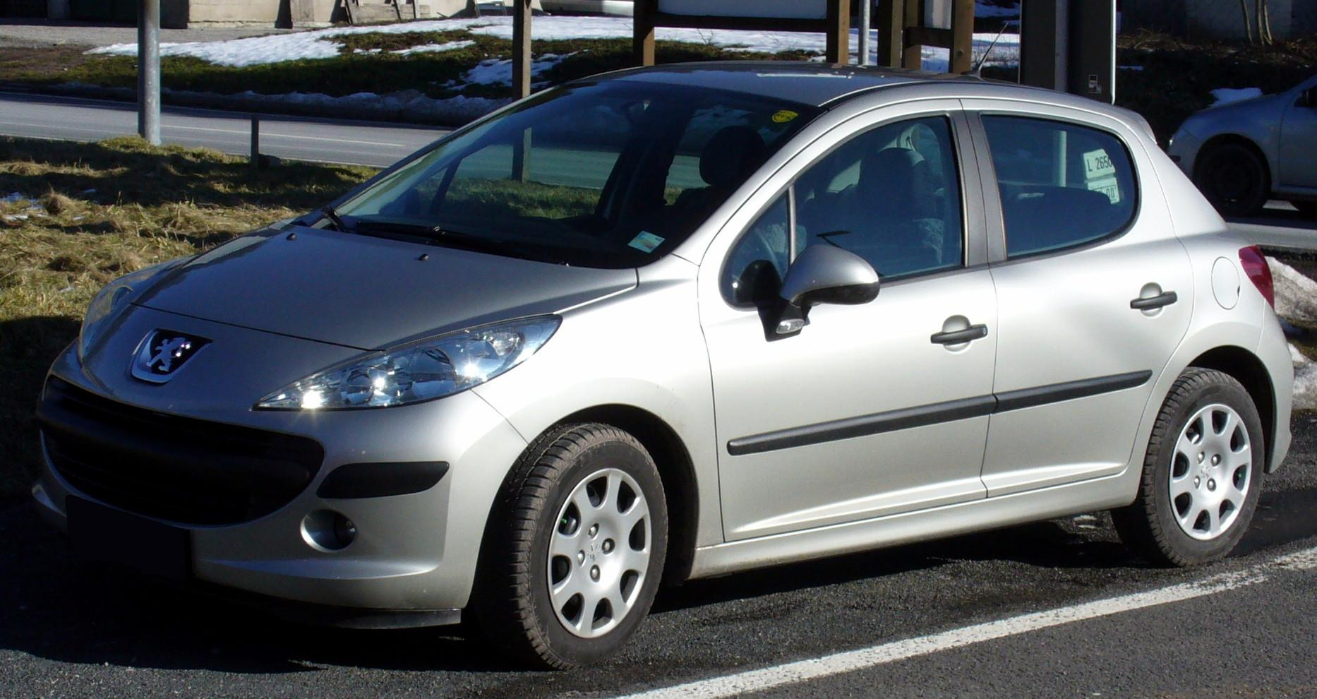 Peugeot 207 five-door